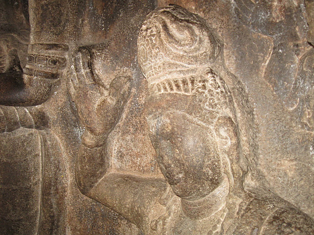 பல்லவர் காலத்திய குடைவரைக் கோயில்களில் விளங்கும் சிலைகளின் அழகிய வடிவம்